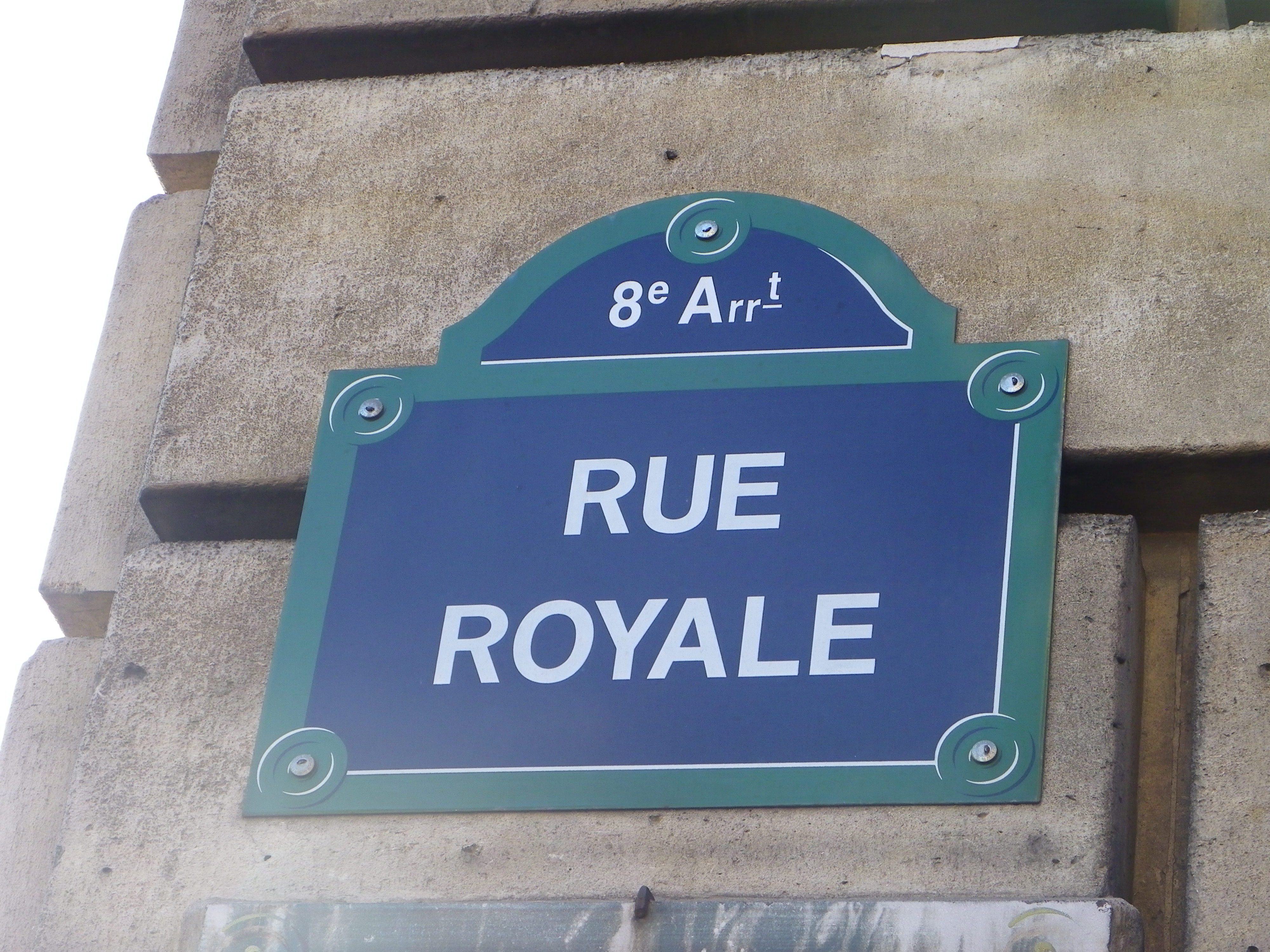 Plaque rue Royale à Paris